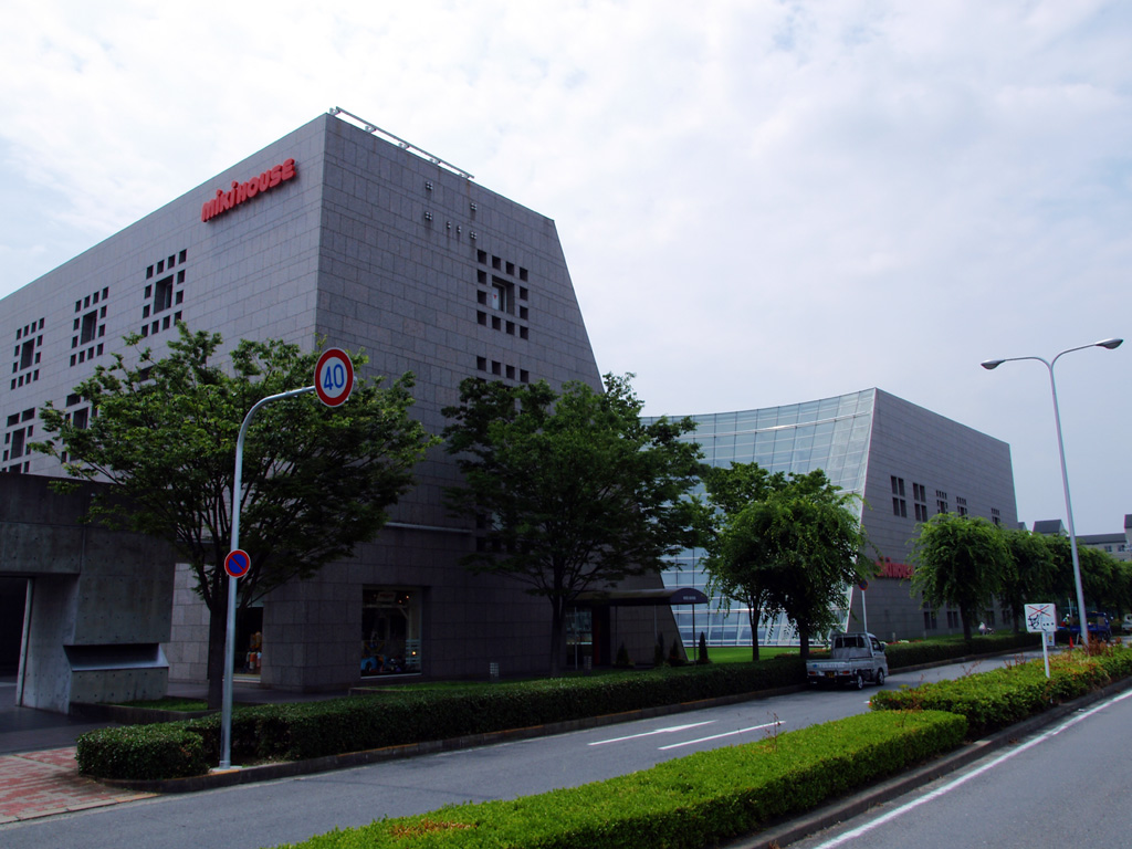 三起商行株式会社（MIKI HOUSE）本社 所在地：大阪府八尾市若林町1-76-2